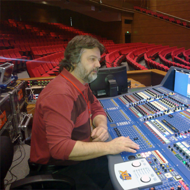 Виктор Алавацкий, звукорежиссер